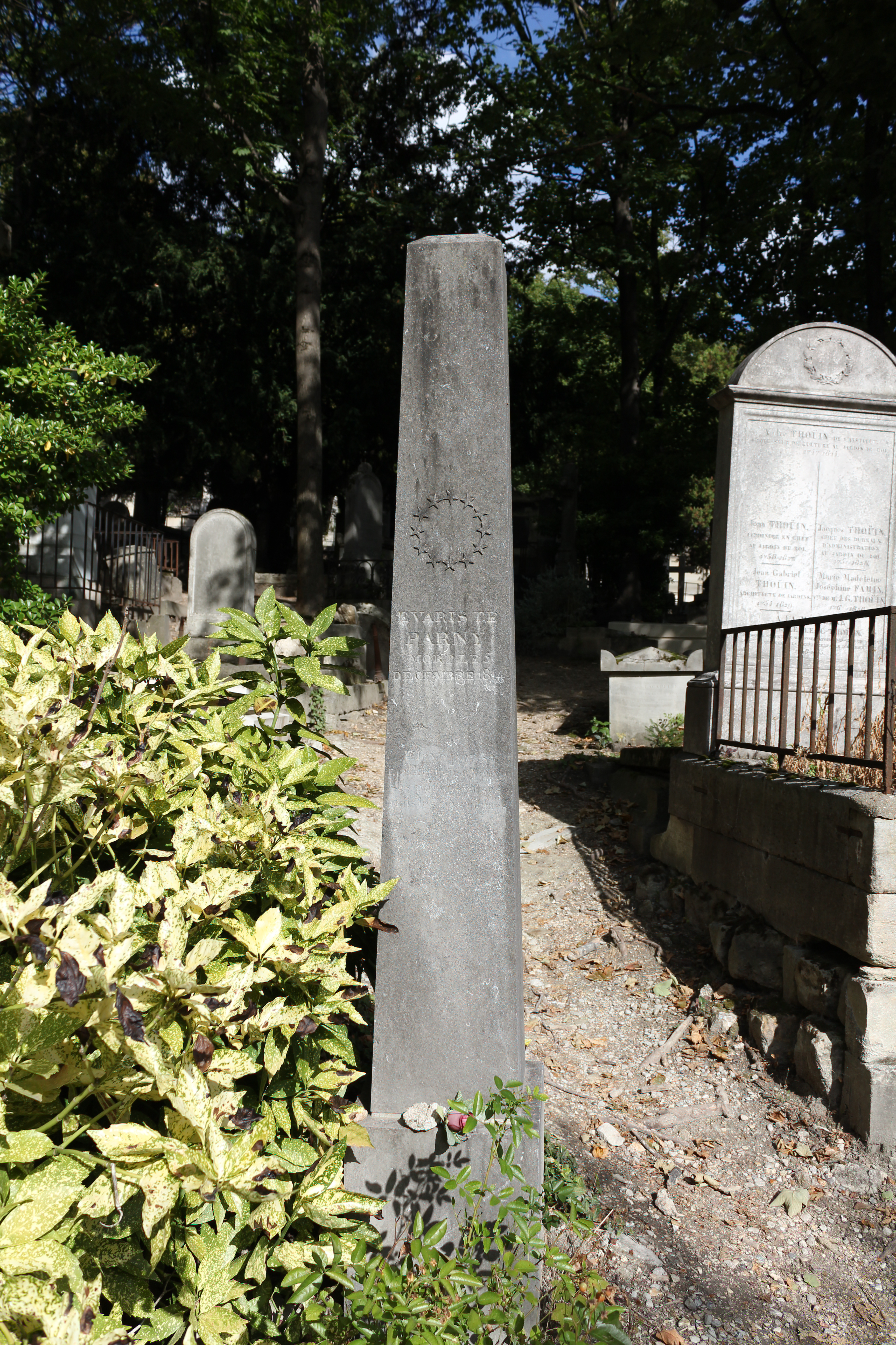 Sépulture du poète Évariste de Parny (1753-1814). Petit obélisque en granit noir surmonté à l'origine d'une urne cinéraire.